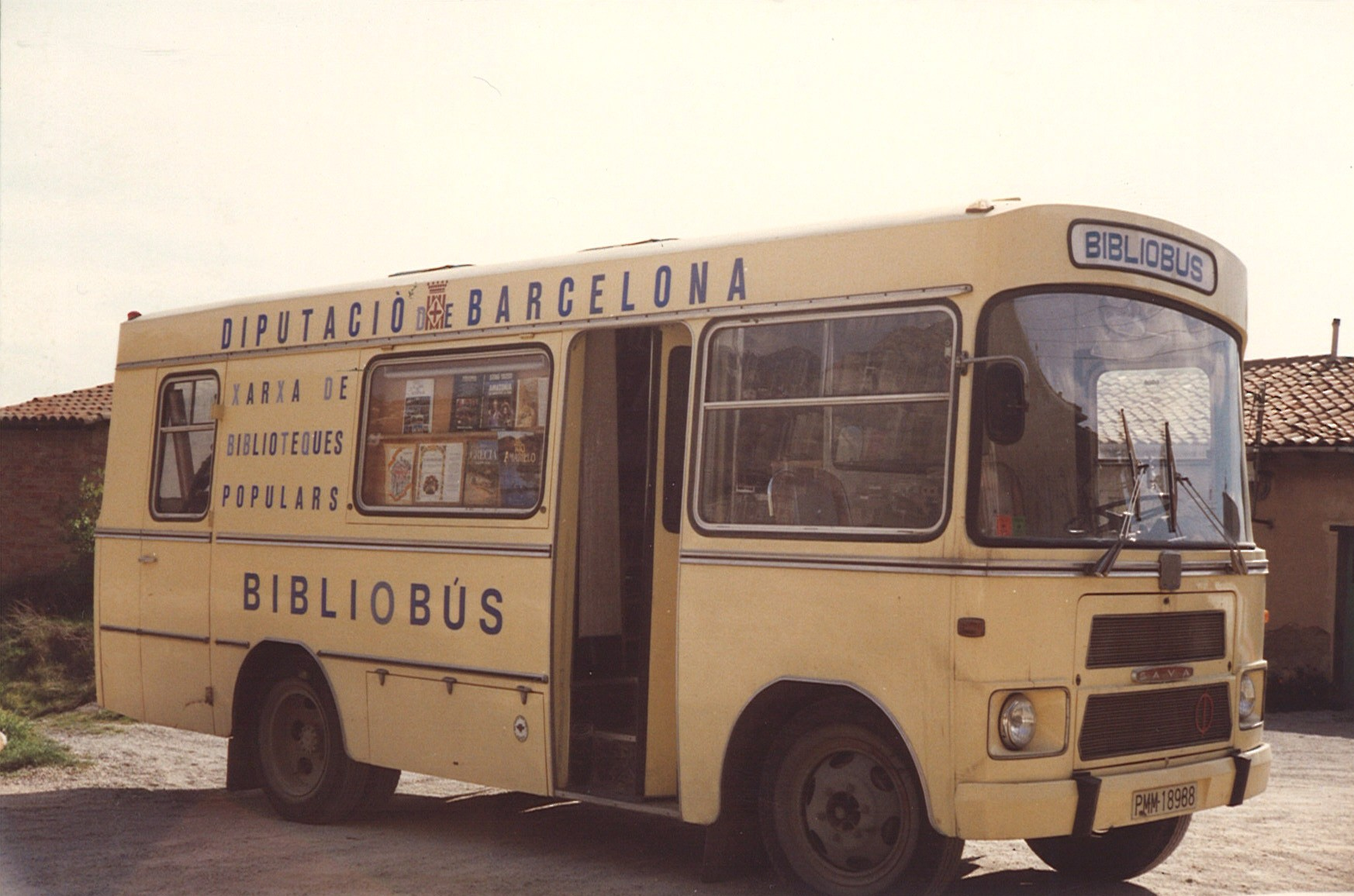 El primer bibliobús en funcionament de la Diputació de Barcelona, més tard batejat com a Bibliobús de Pedraforca